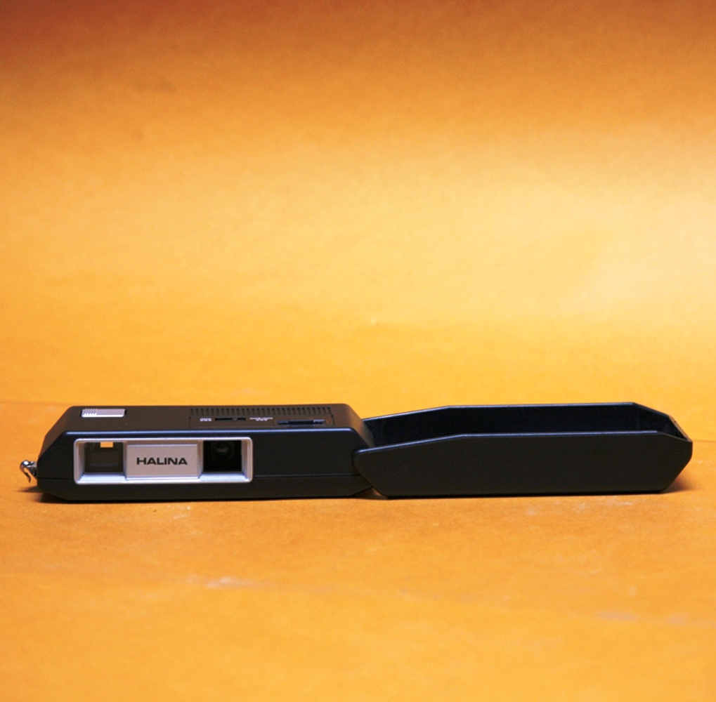 Coll. Marcè CL - Haking Mod. Halina 110 Auto-Flip